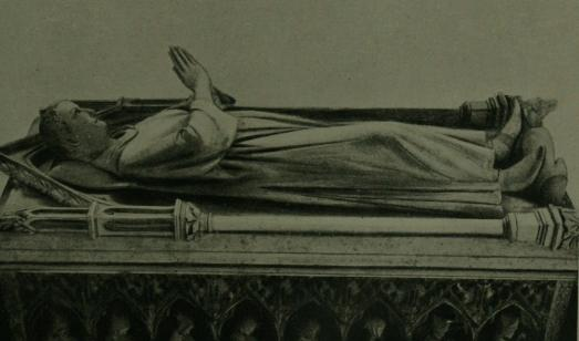 Saint-Denis (Île-de-France), basilique nécropole royale, gisant de Louis de France, fils aîné de Louis IX roi de France.